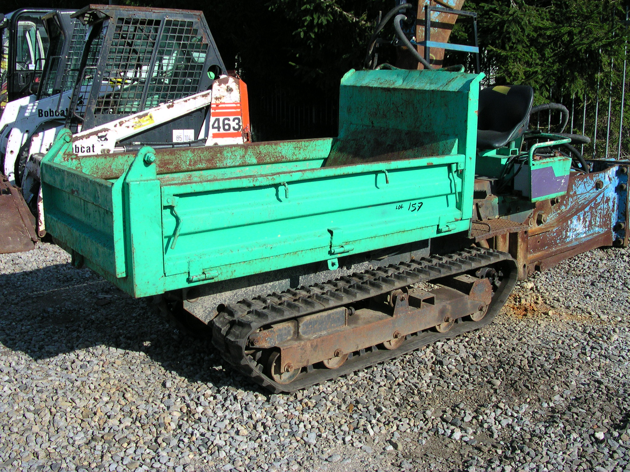 Yanmar C 10 R, Kipper, 1 t Nutzlast, Muldengröße 1600*800*300 mm, Baujahr 1996